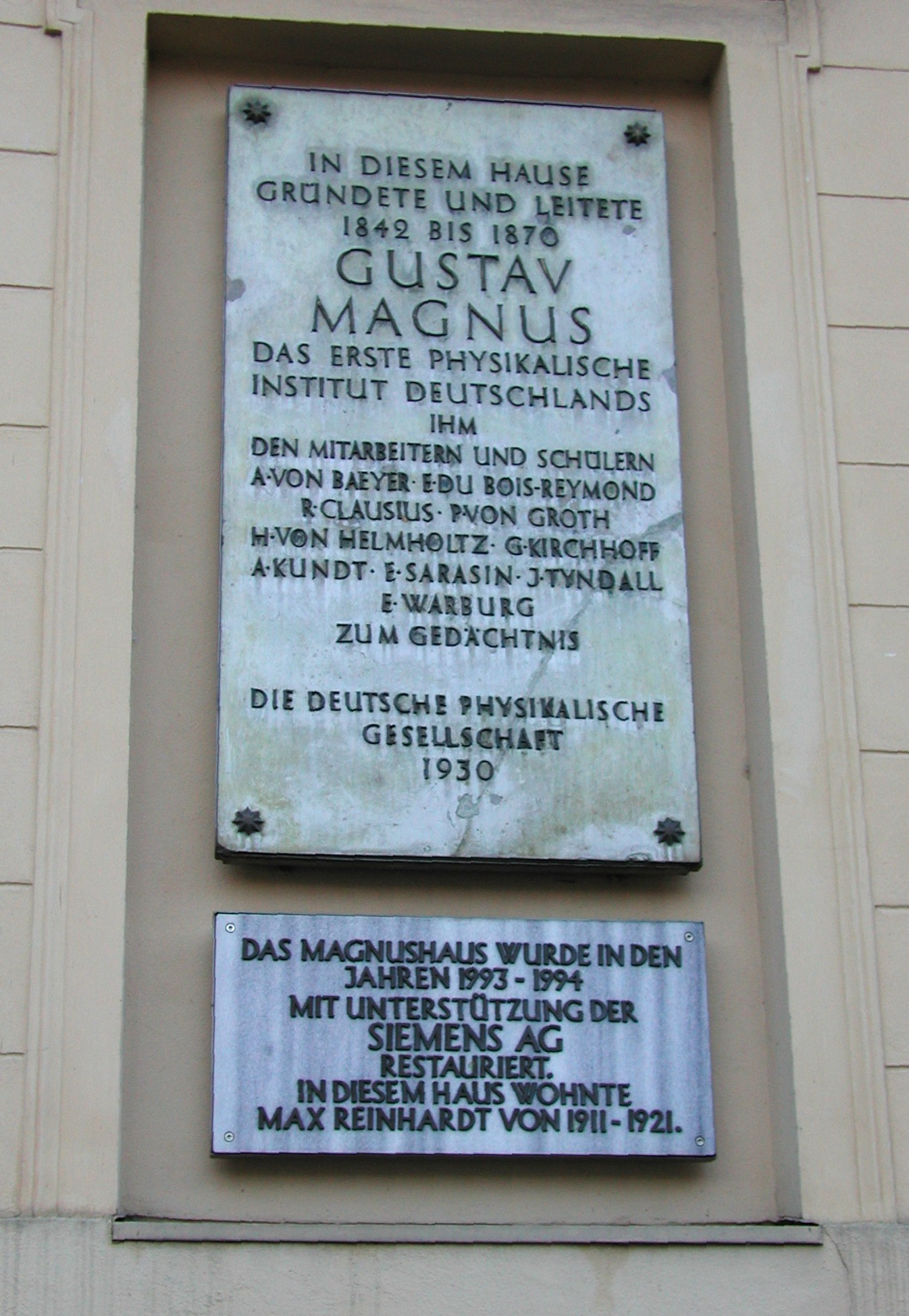 Gedenktafeln am Magnushaus /rememberscripts on the Magnushaus